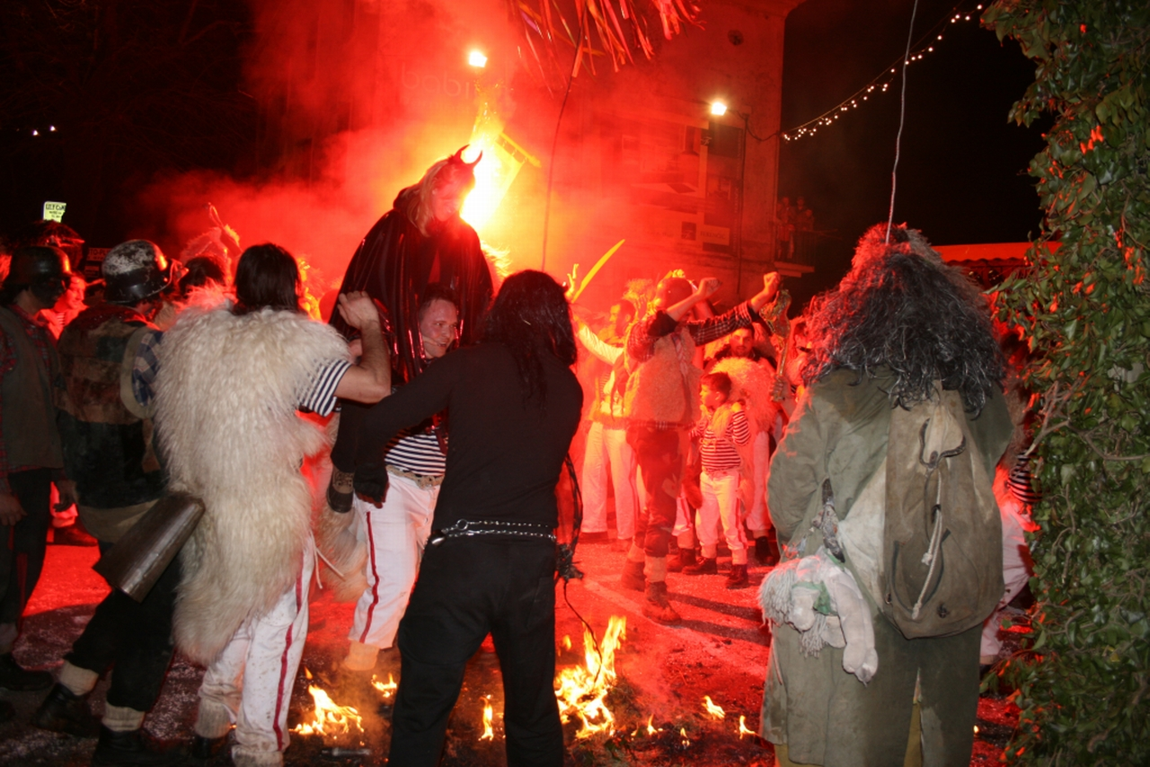 spaljivanje mesopusta u Viškovu